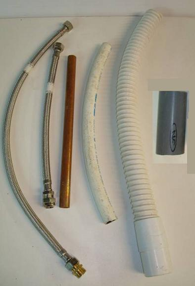 Différents tubes de robinetterie-plomberie